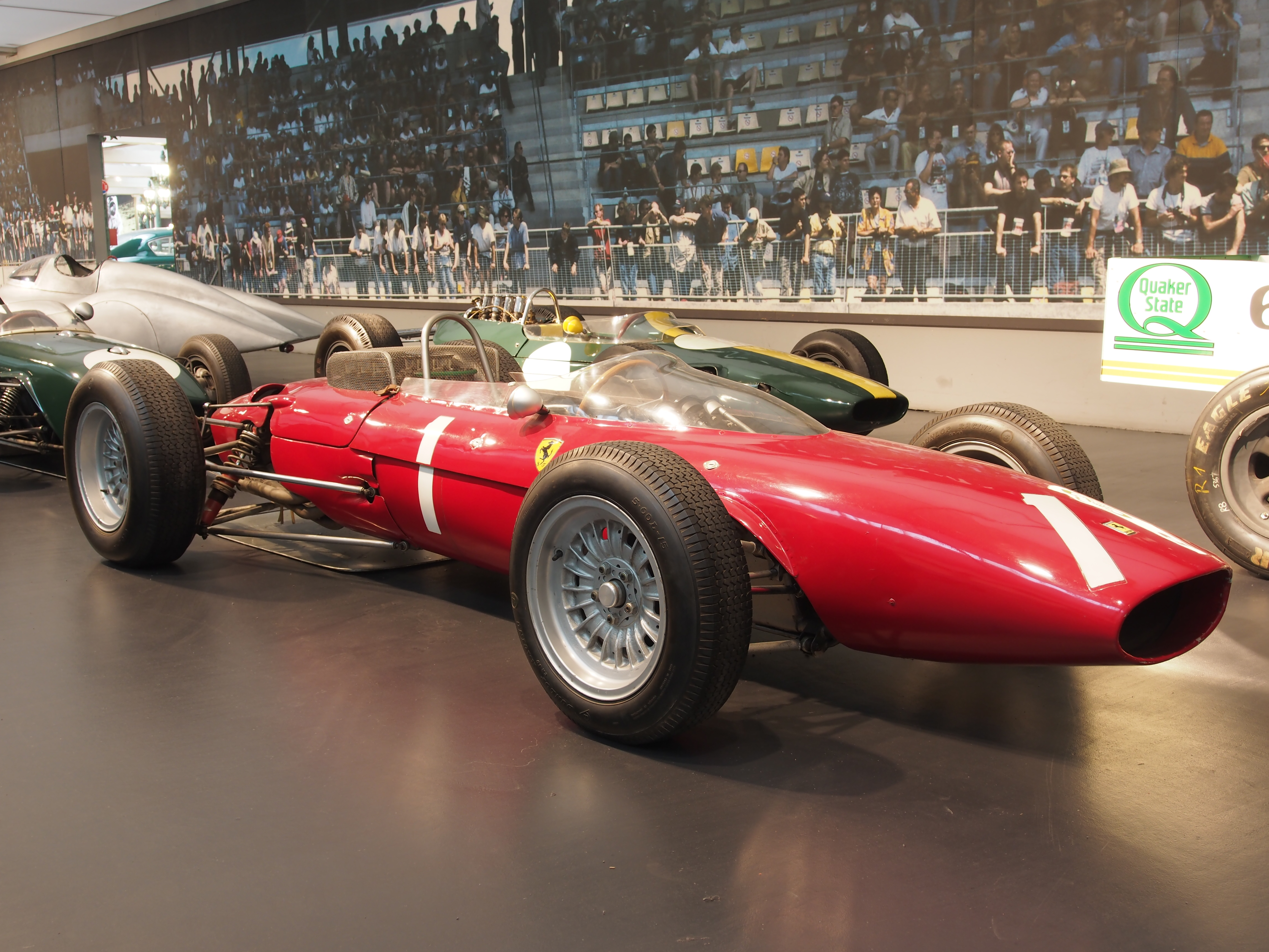 Photographed at the Cité de l’Automobile, Musée national de l’automobile, Collection Schlumpf, Mulhouse, France.